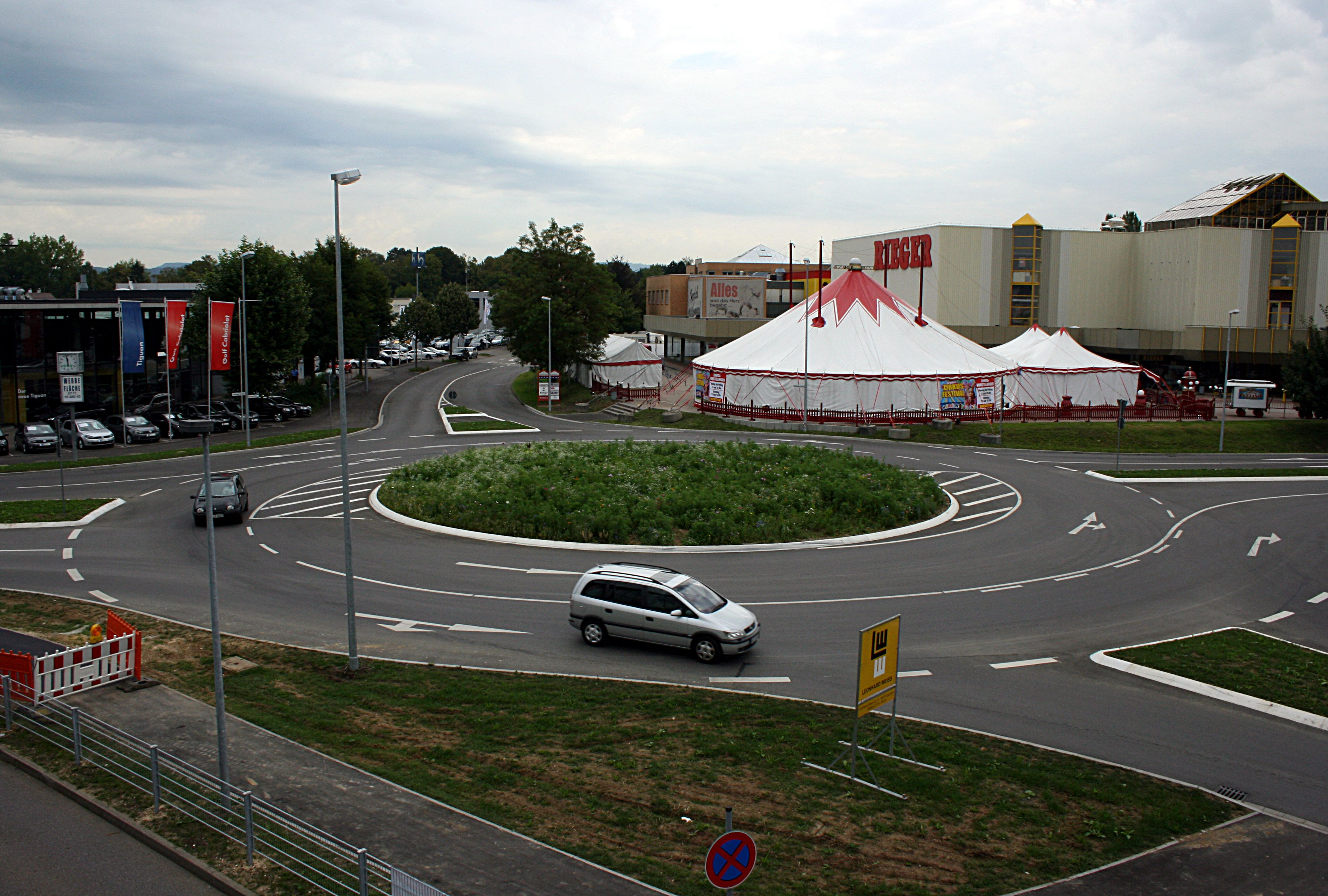 Turbokreisverkehr Heininger Straße/Holzheimer Straße in Göppingen von Westen.